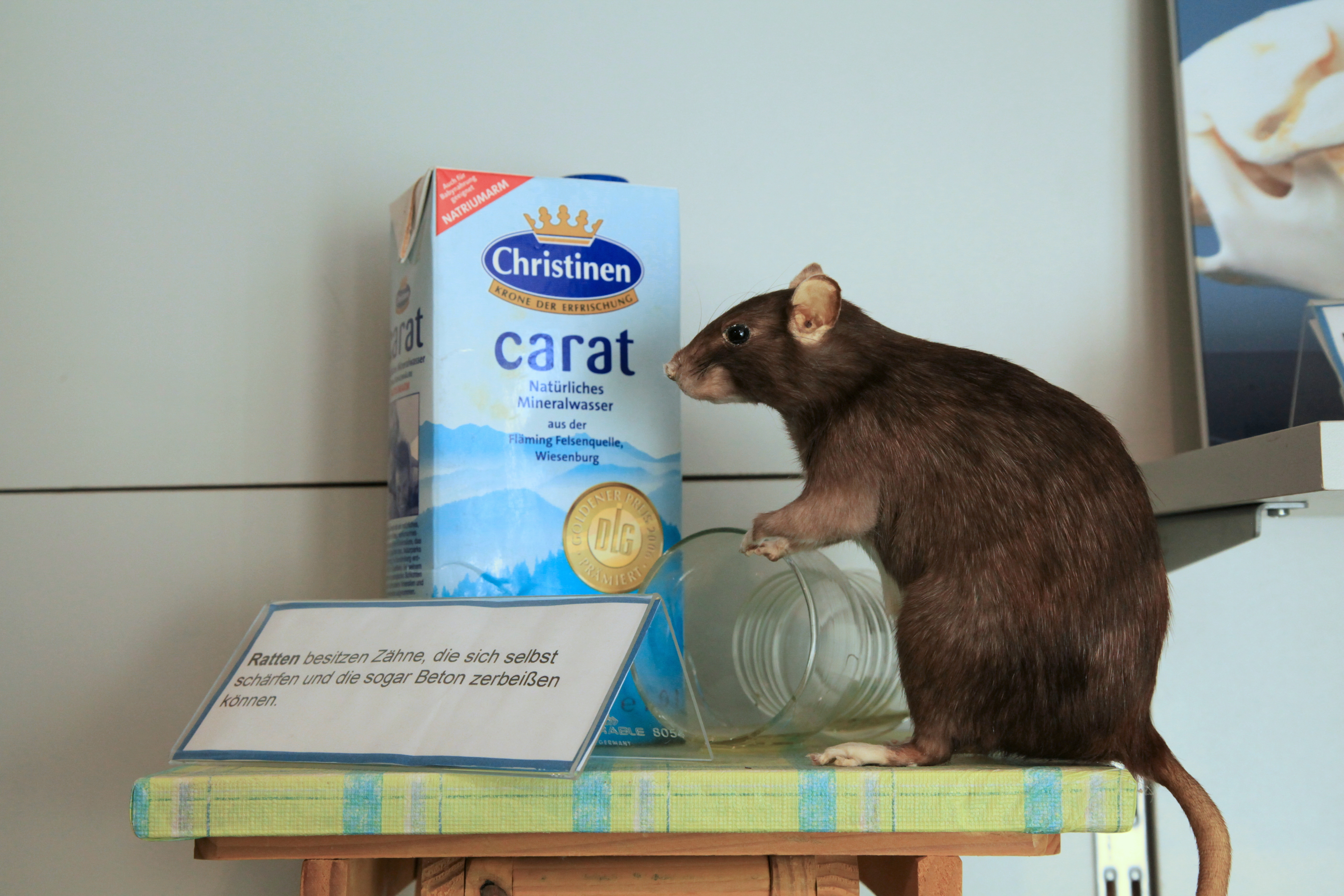 Haus Ruhrnatur, Alte Schleuse 3 in Mülheim an der Ruhr